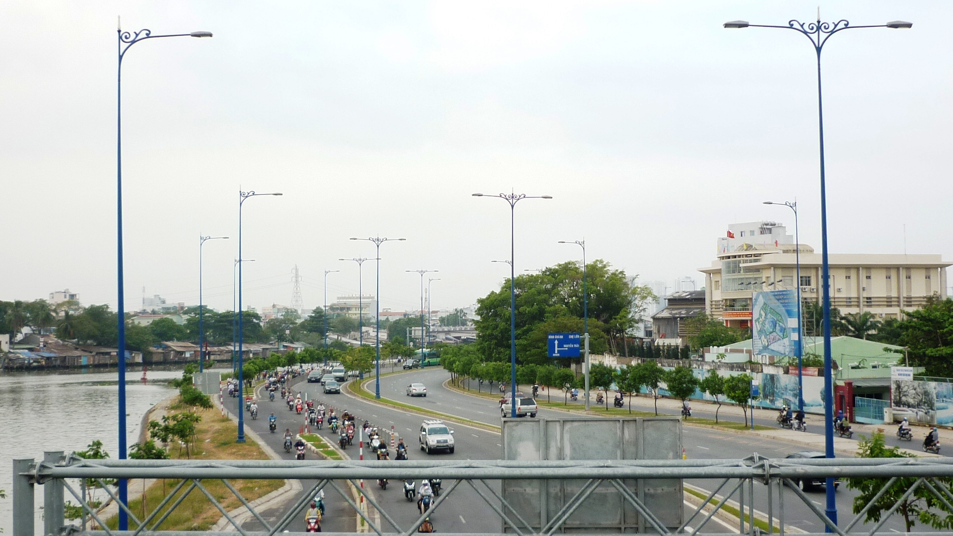 Đại lộ Võ Văn Kiệt đoạn qua quận 5 và kênh Tàu Hũ.